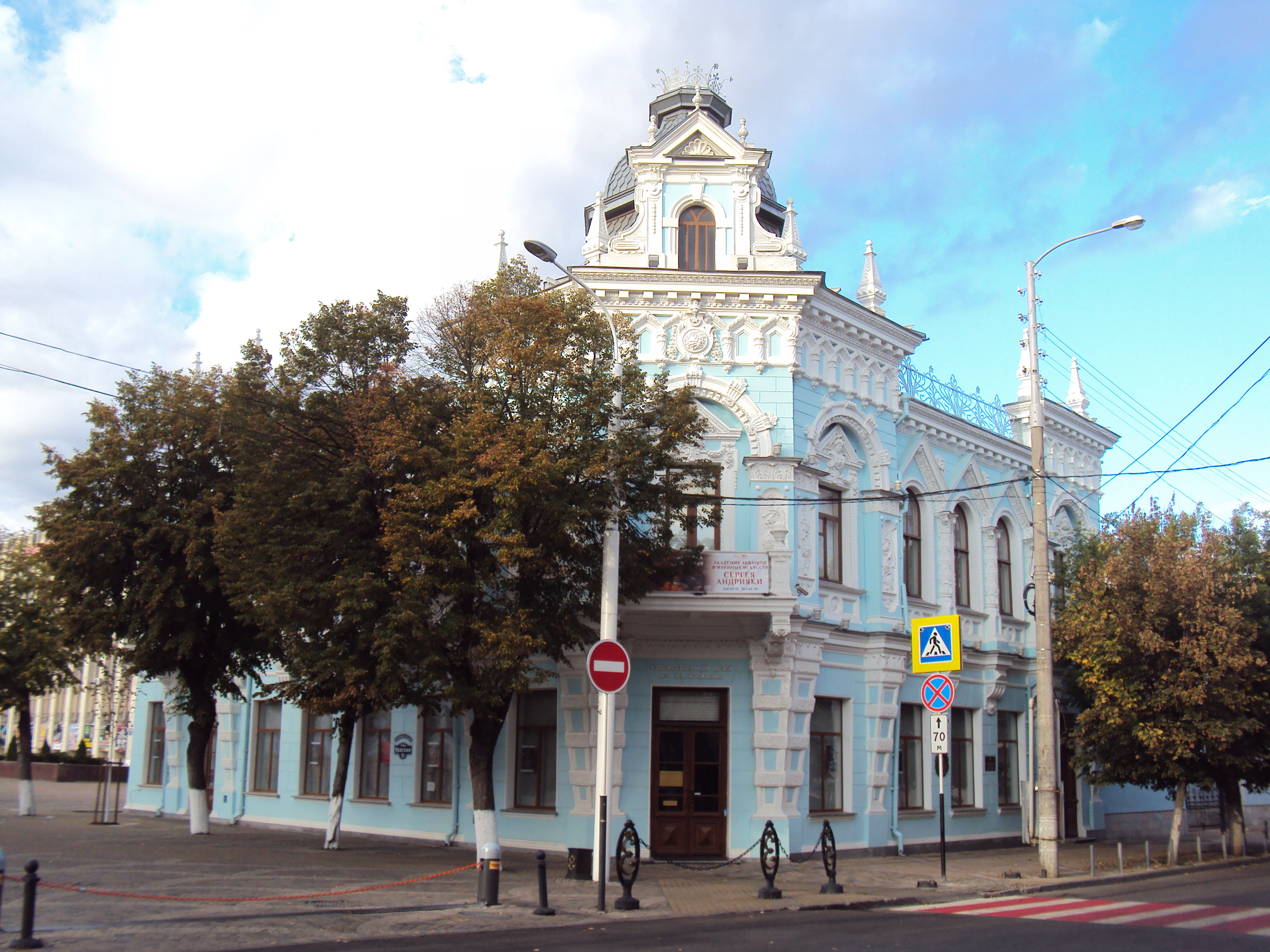 Дом Шарданова Б. Б. (Краснодарский край, Краснодар, Красная улица, 13, Советская улица, 44)